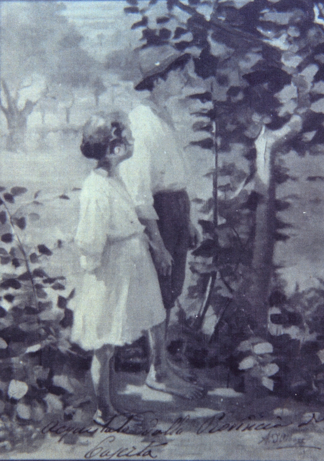 Partito! - esposto a Napoli nel 1912 - acquistato dalla Provincia di Caserta - oggi alla Camera di Commercio di Napoli